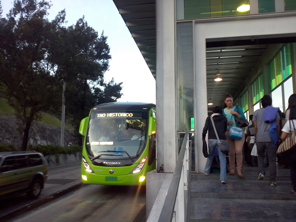 Estación municipal